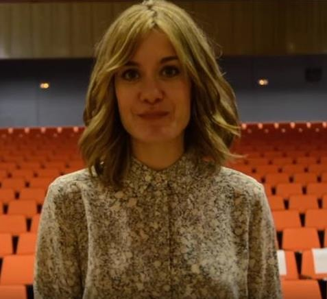 Alexandra Jiménez